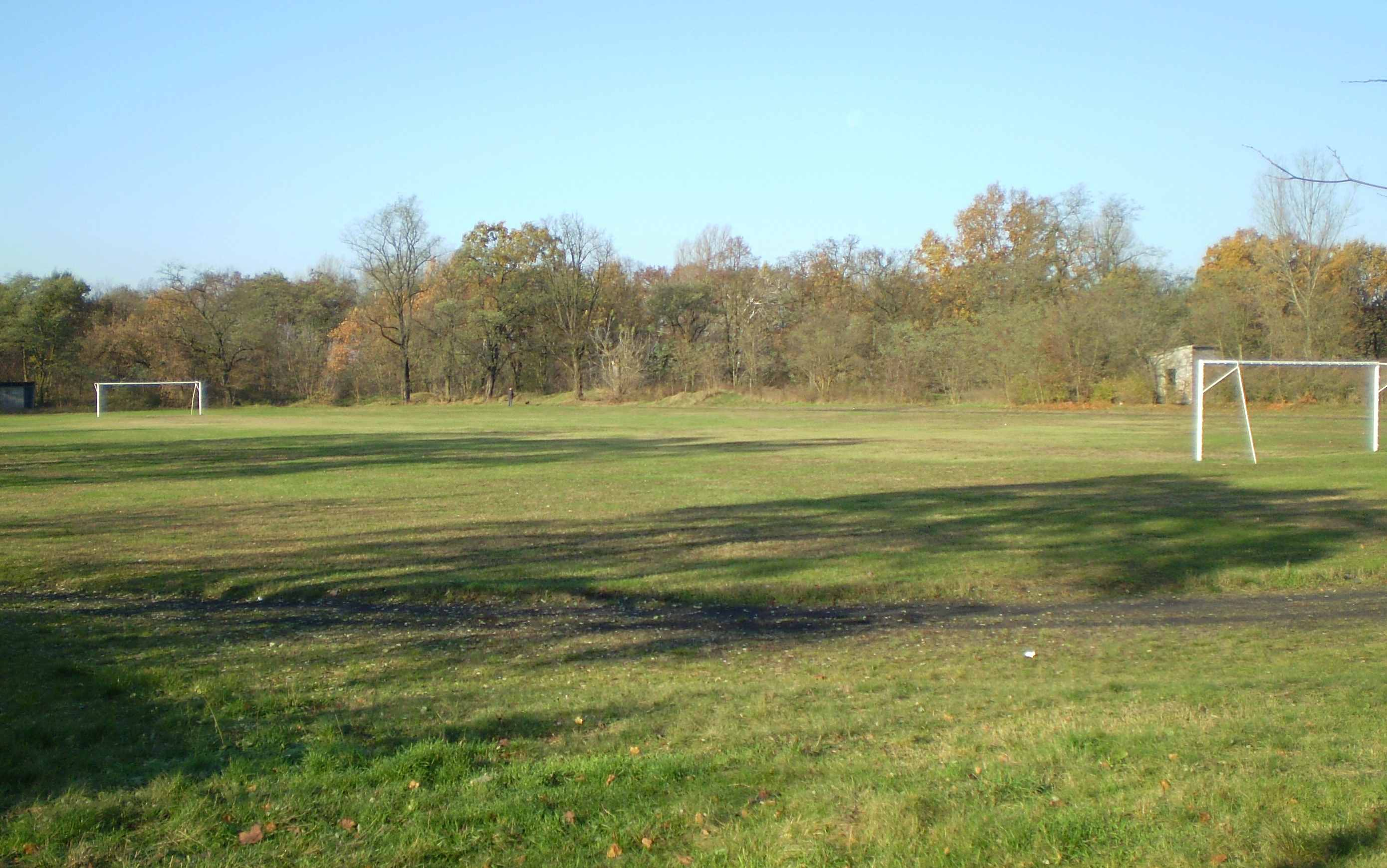 Stadion w Gubinie przy ul. Sportowej